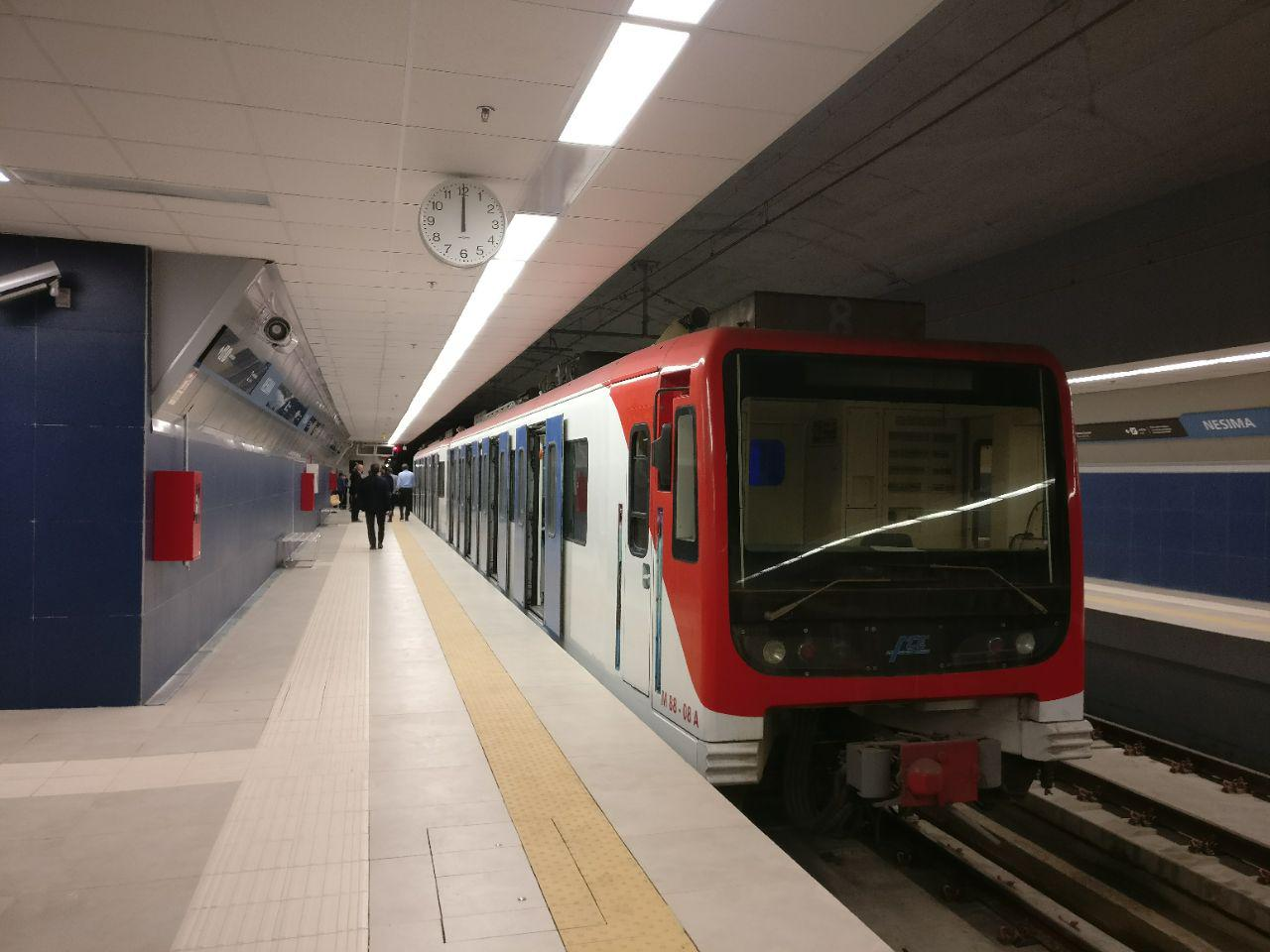 Stazione Nesima, Metropolitana di Catania